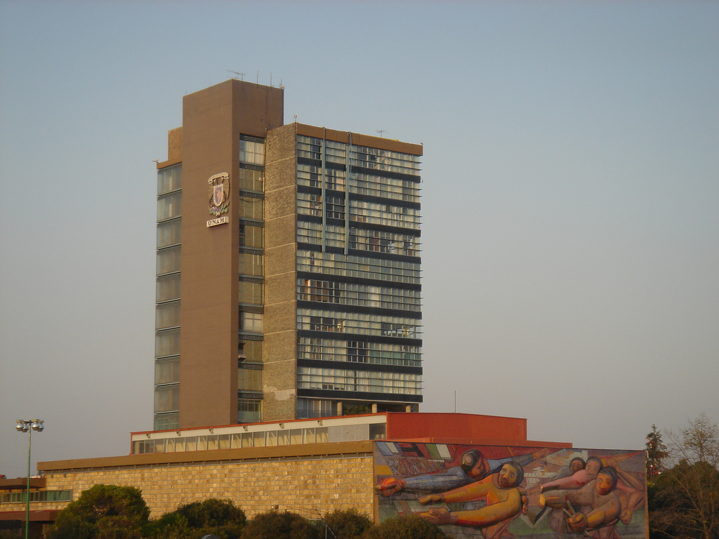 De la UNAM